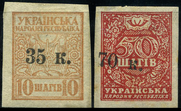 Почтовые марки администрации Главного командования ВСЮР в Мариуполе, 1919